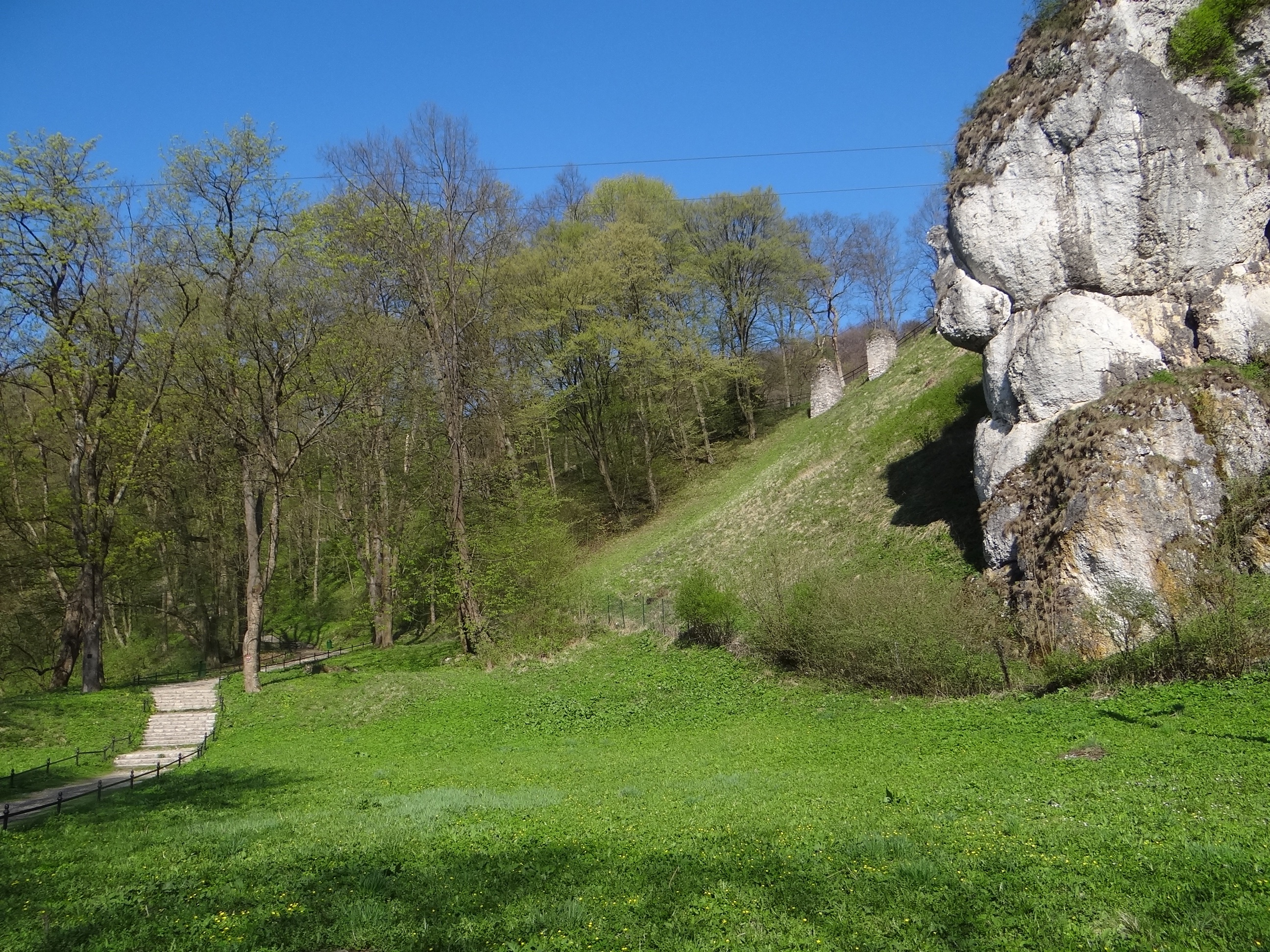 Park Zamkowy w Ojcowie